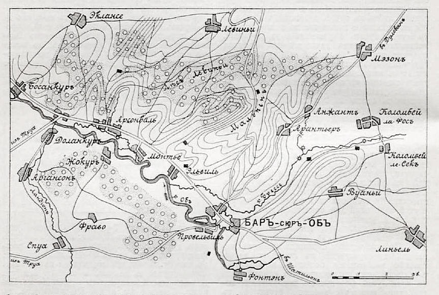 Данное изображение было использовано в статье «Бар-сюр-Об» опубликованной в четвёртом томе «Военной энциклопедии», который был издан книгоиздательским товариществом Ивана Дмитриевича Сытина в 1911 году в столице Российской империи городе Санкт-Петербурге.